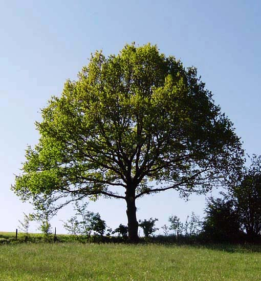 vrijstaande eik